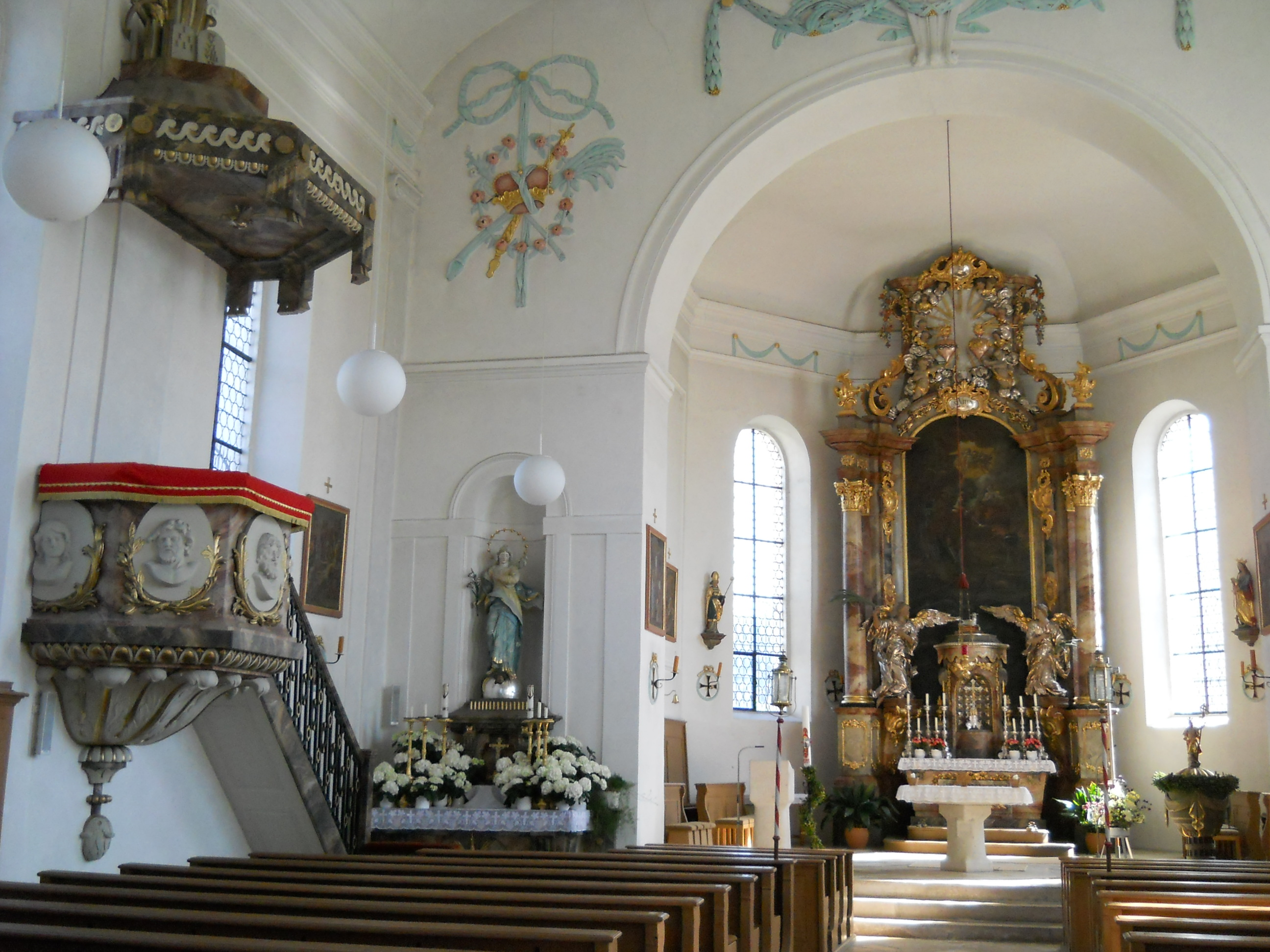 St. Veit, Ortsteil von Pleinfeld im Landkreis Weißenburg-Gunzenhausen (Bayern), Kath. Pfarrkirche St. Vitus, Inneres